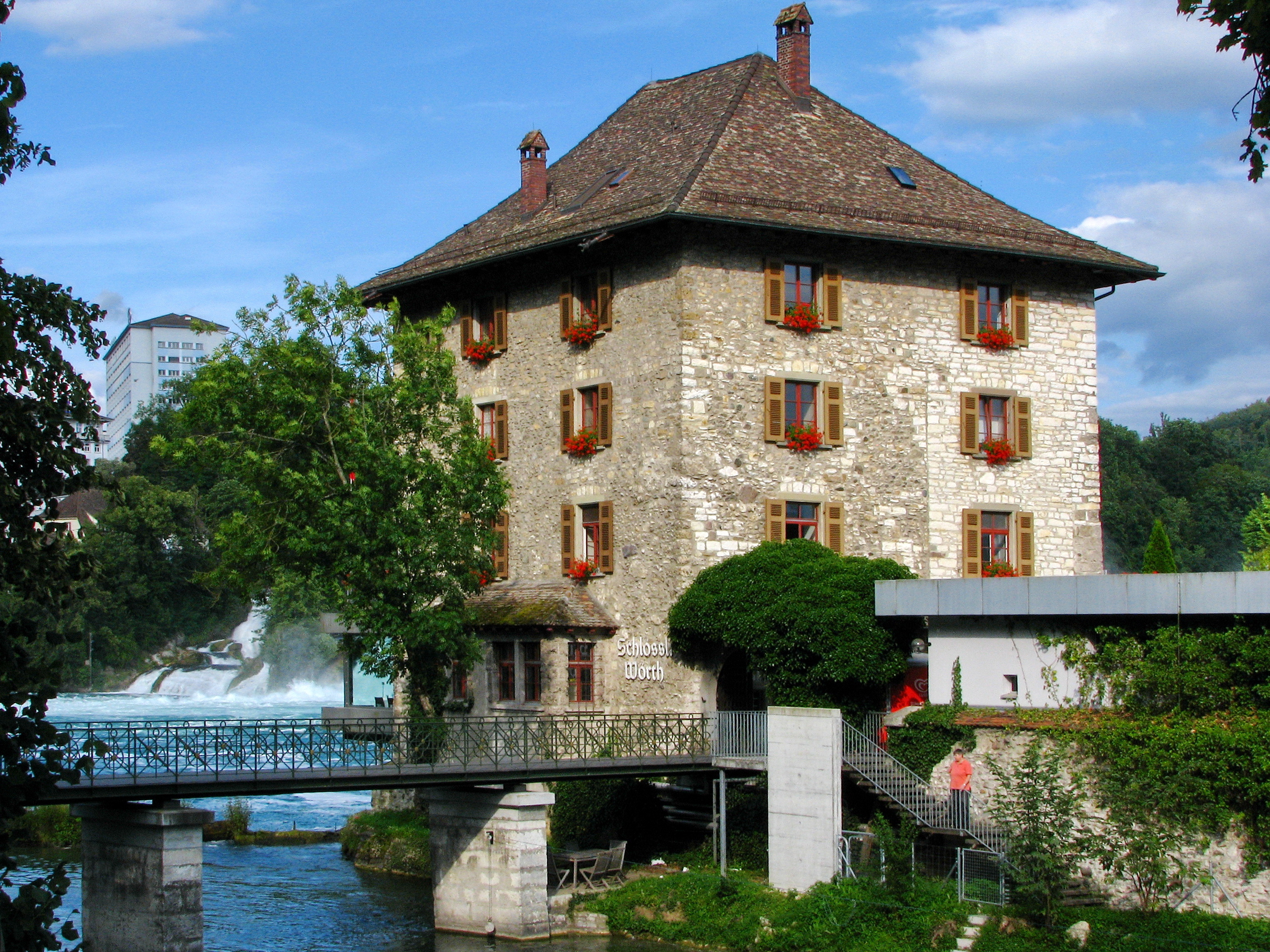 Schlössli Wörth castle in Neuhausen am Rheinfall (Switzerland) and Rheinfall in the background.